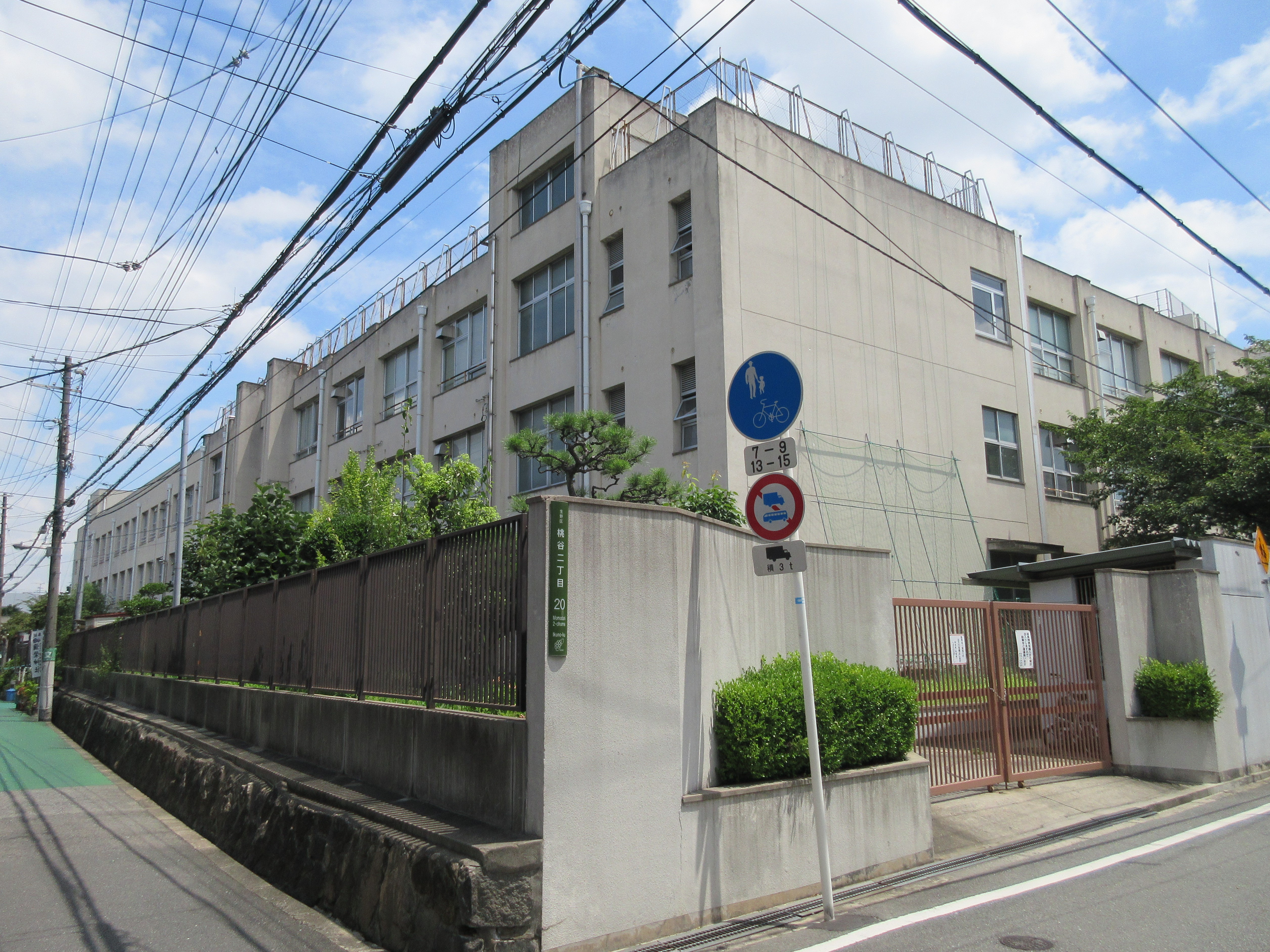 大阪市立鶴橋小学校